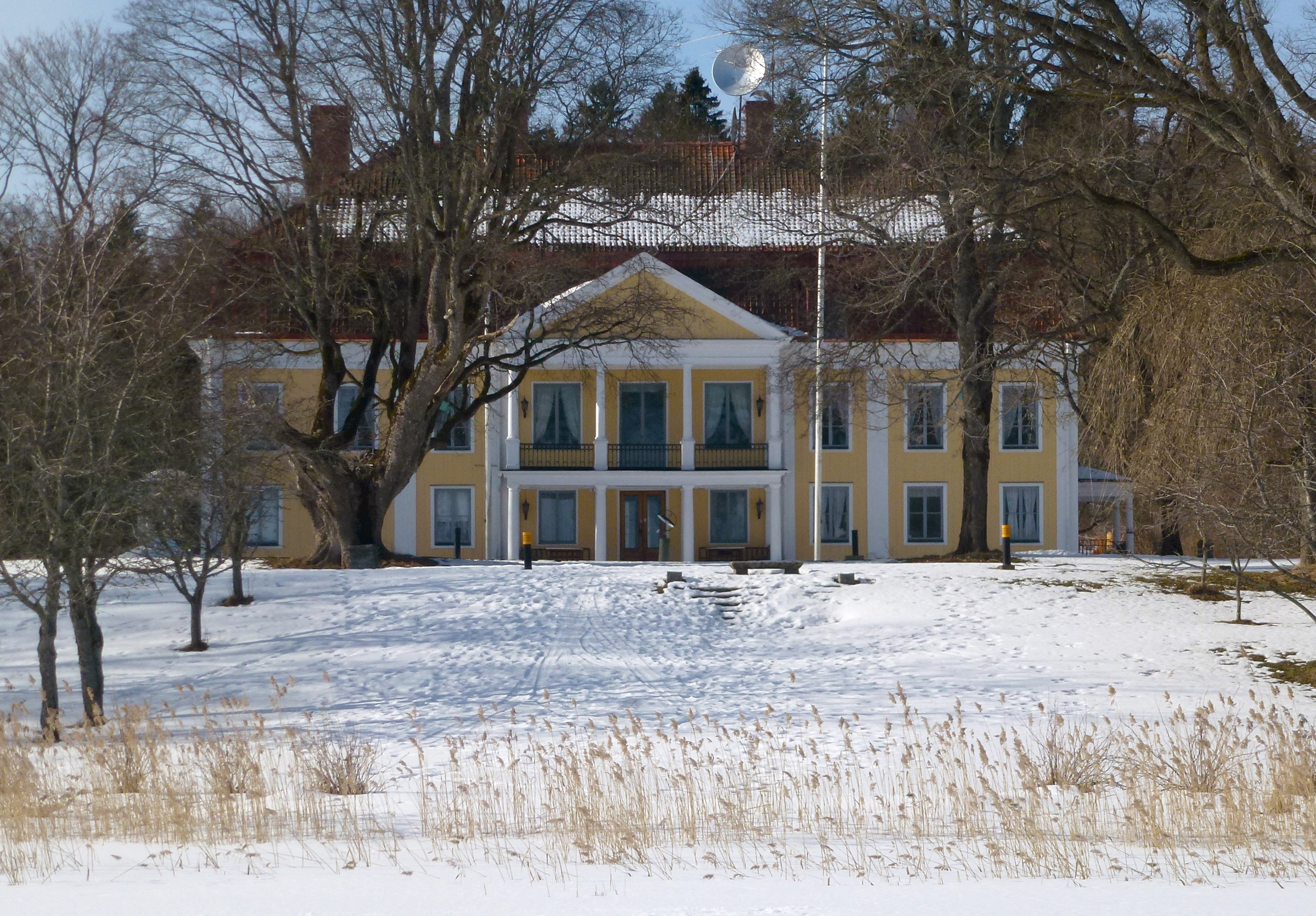 Malmsjö gård, fasad mot öst